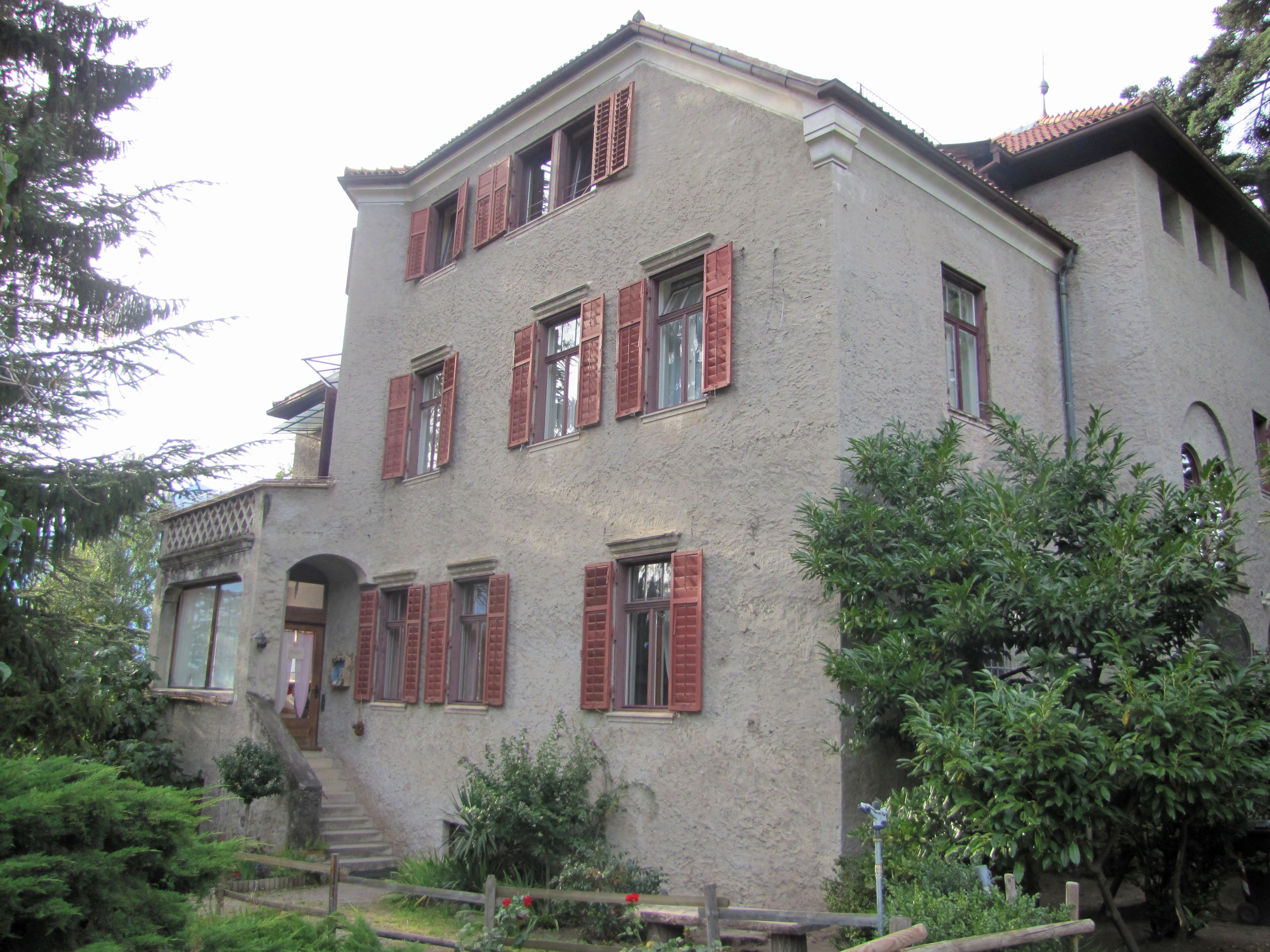 Freie Waldorfschule Christian Morgenstern in Meran (Südtirol)